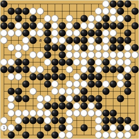 1958年9月1-2日 第13期本因坊戦挑戦手合七番勝負第6局 高川秀格(先番)-杉内雅男 268手目